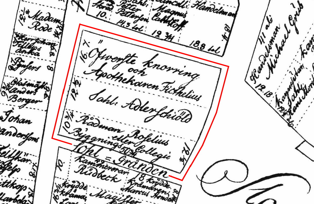 Kvarteret Aesculapius med tomtägare 1693